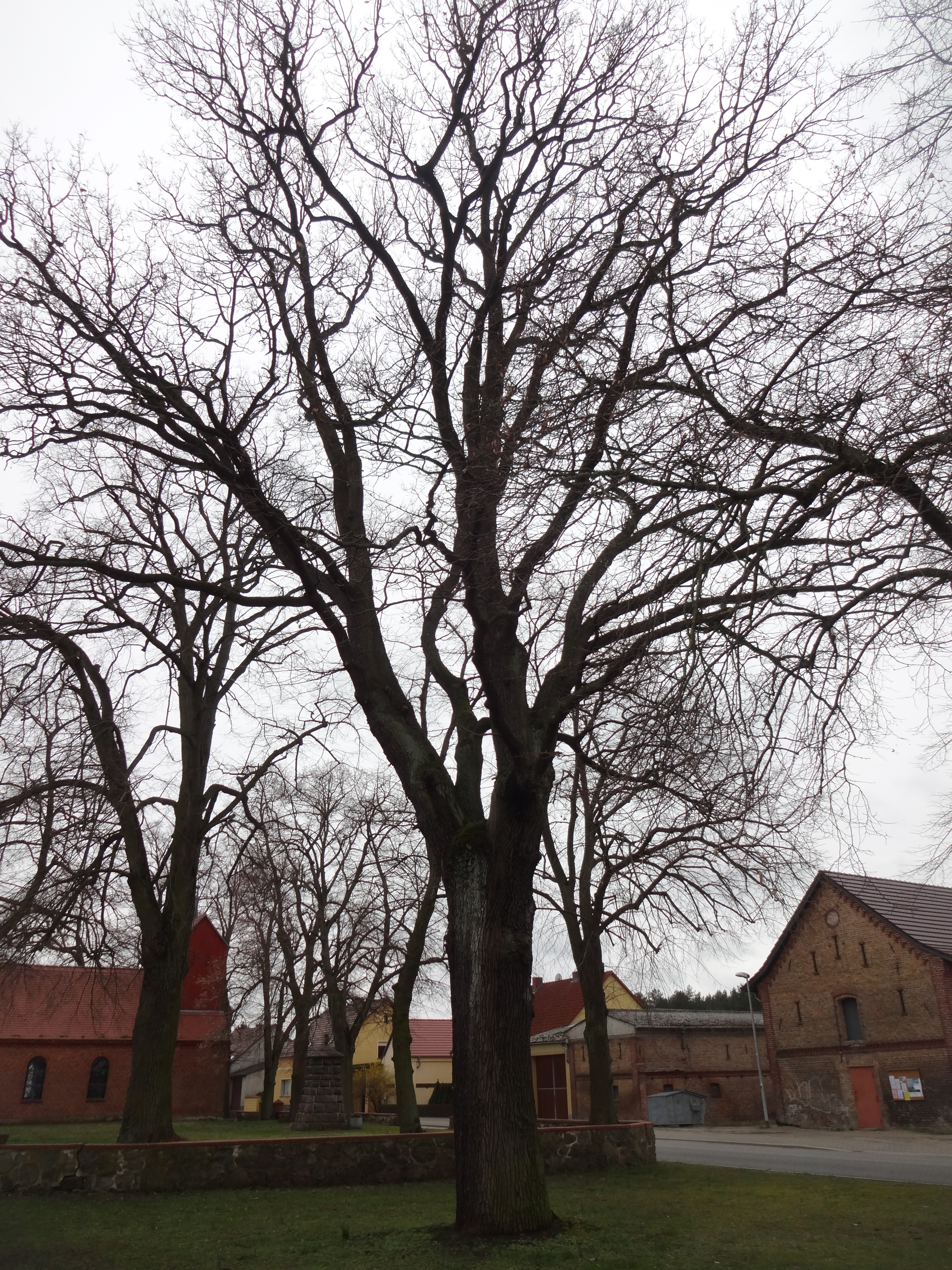 als Naturdenkmal geschütztes Friedenseiche in Pernitz